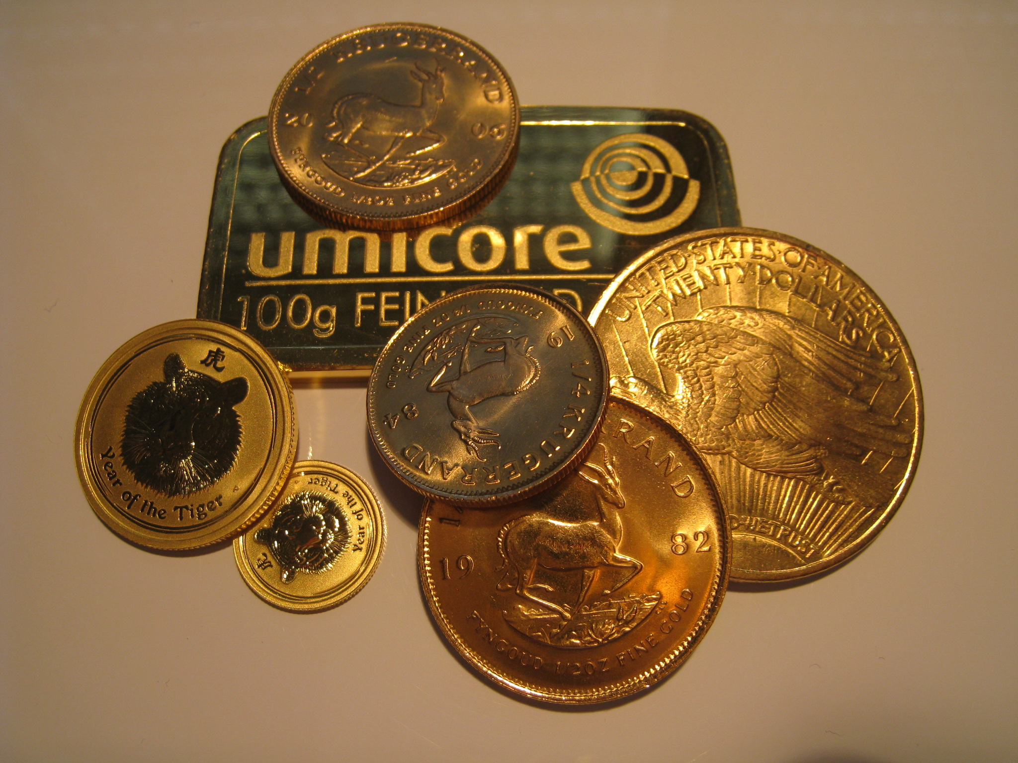 Anlagegold